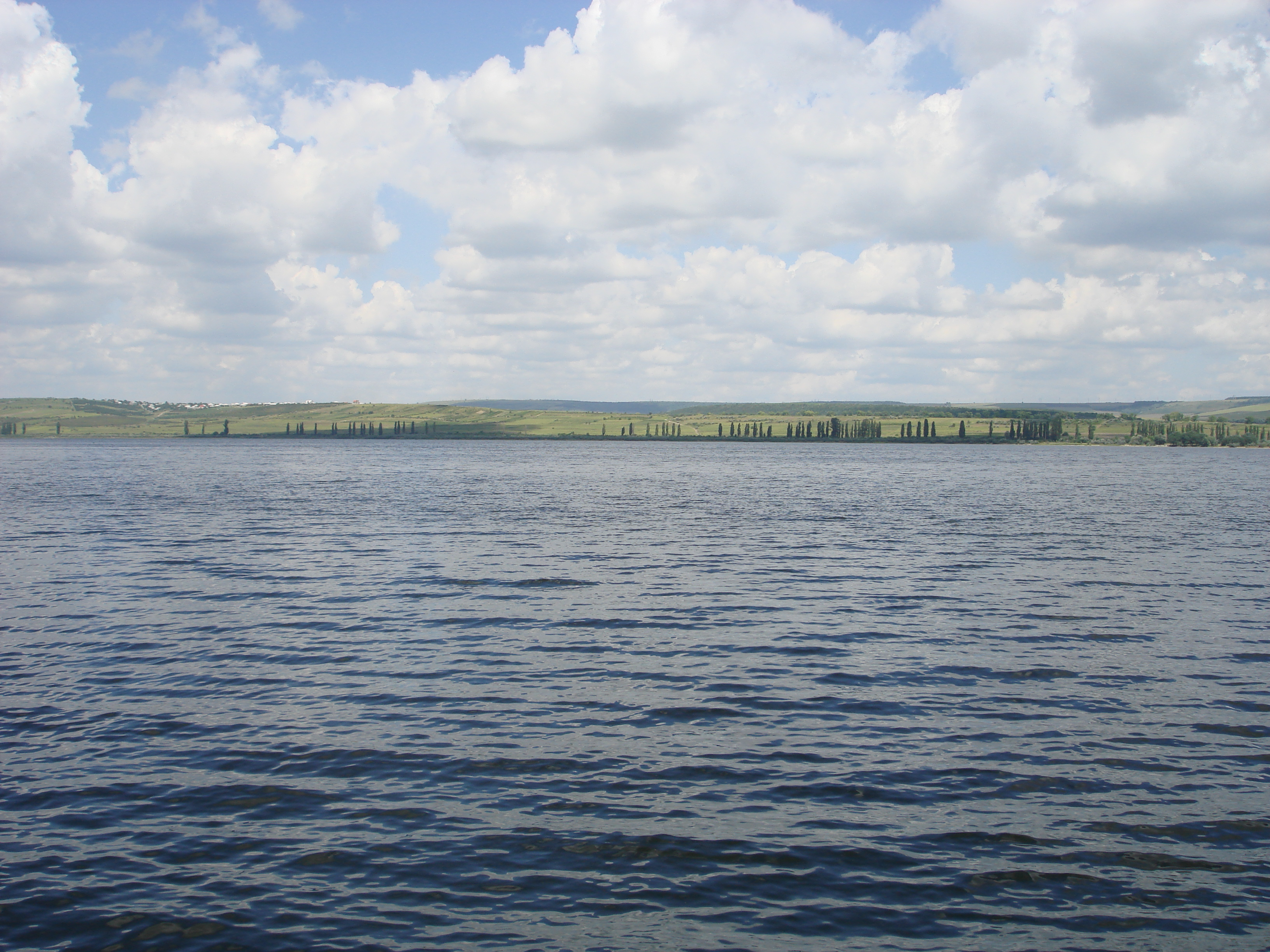 Гидигичское водохранилище